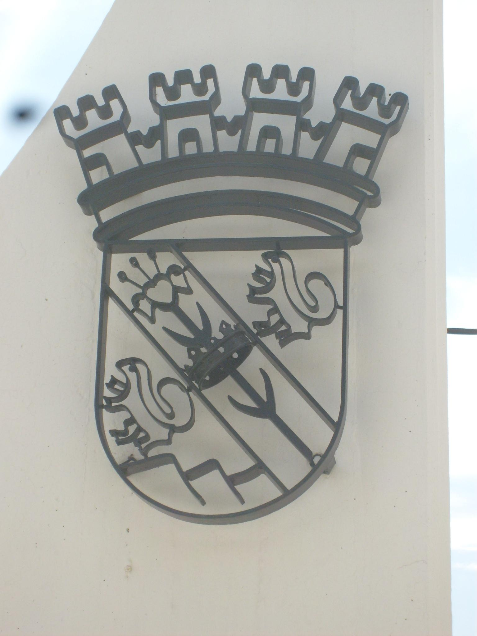 Escudo del monumento de Salliquelo